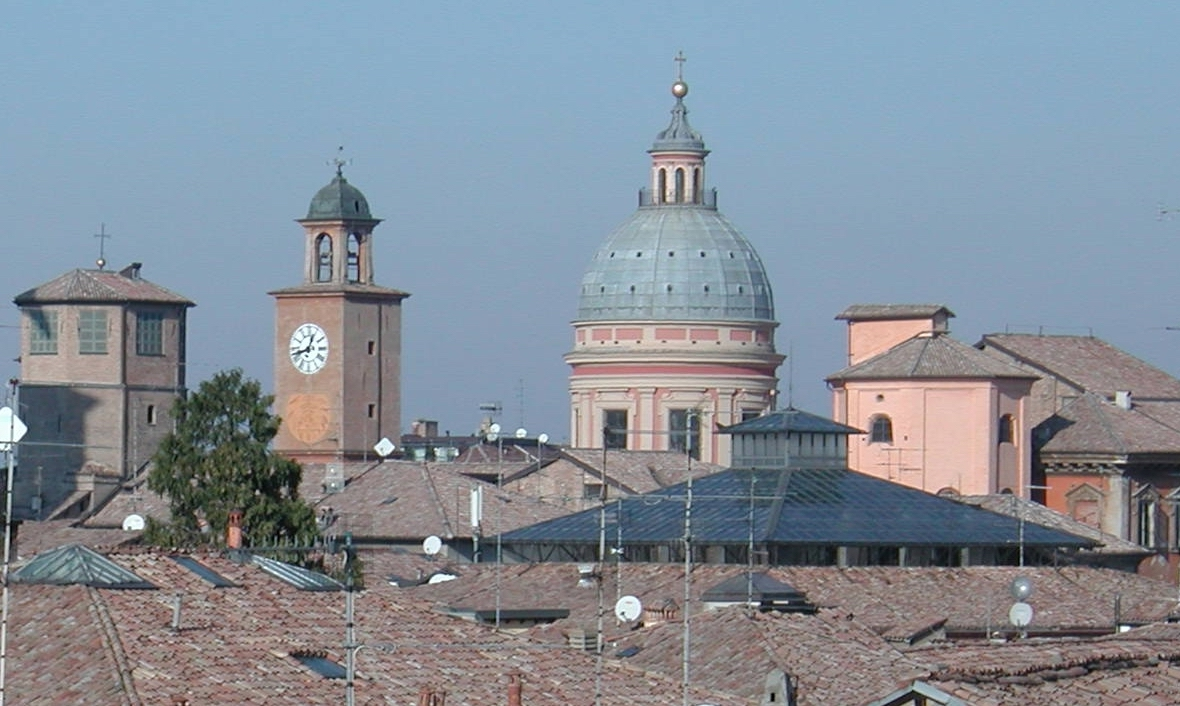 Reggio Emilia cupola del duomo e torre del palazzo del monte author:Paolo Picciati